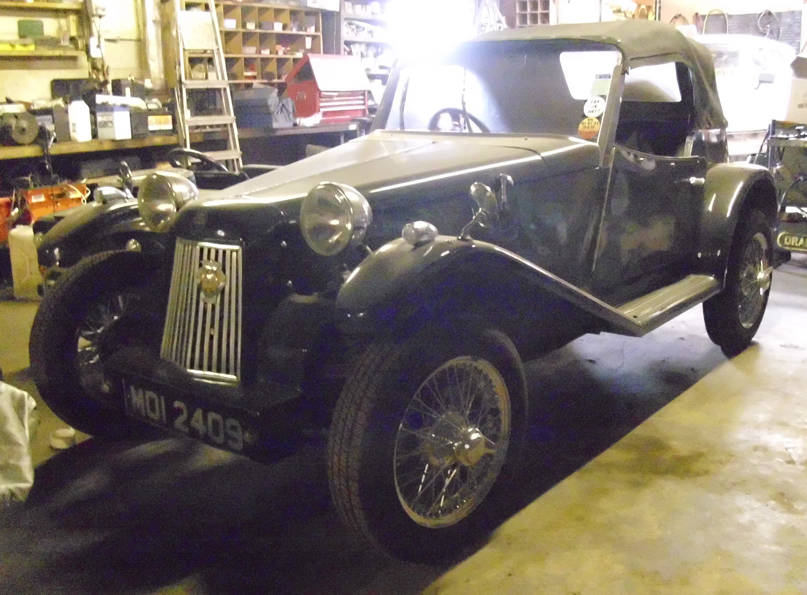 Tempest